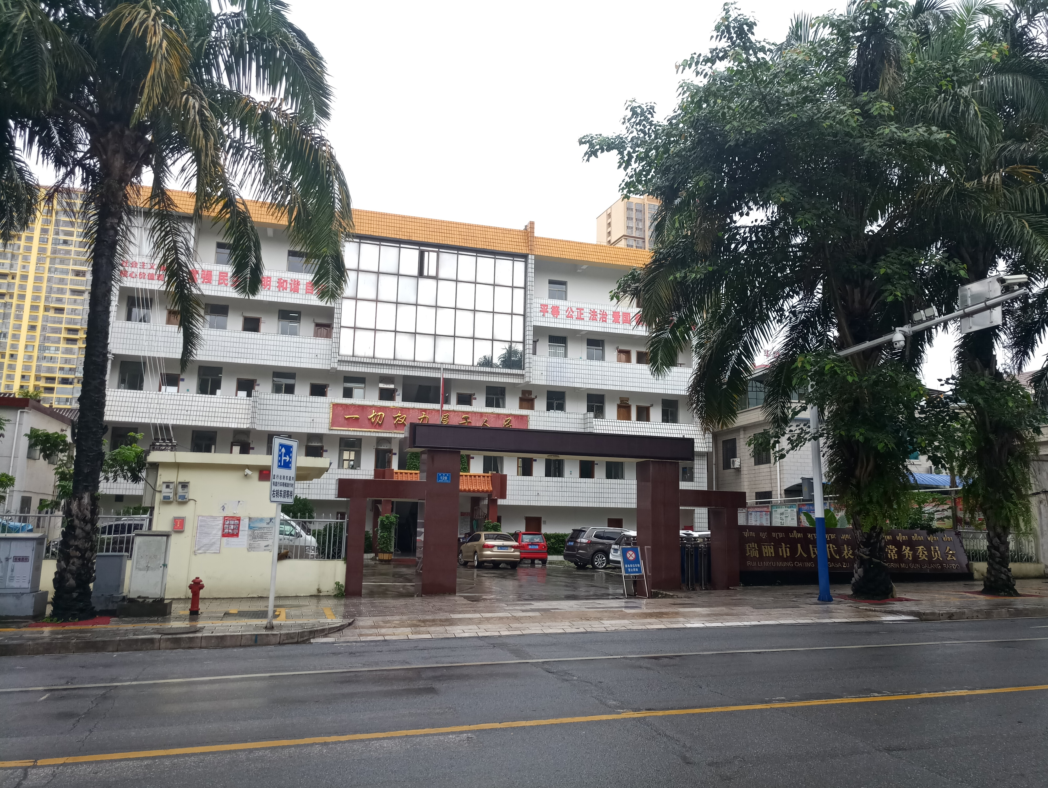 中文（中国大陆）: 瑞丽市人民代表大会常务委员会